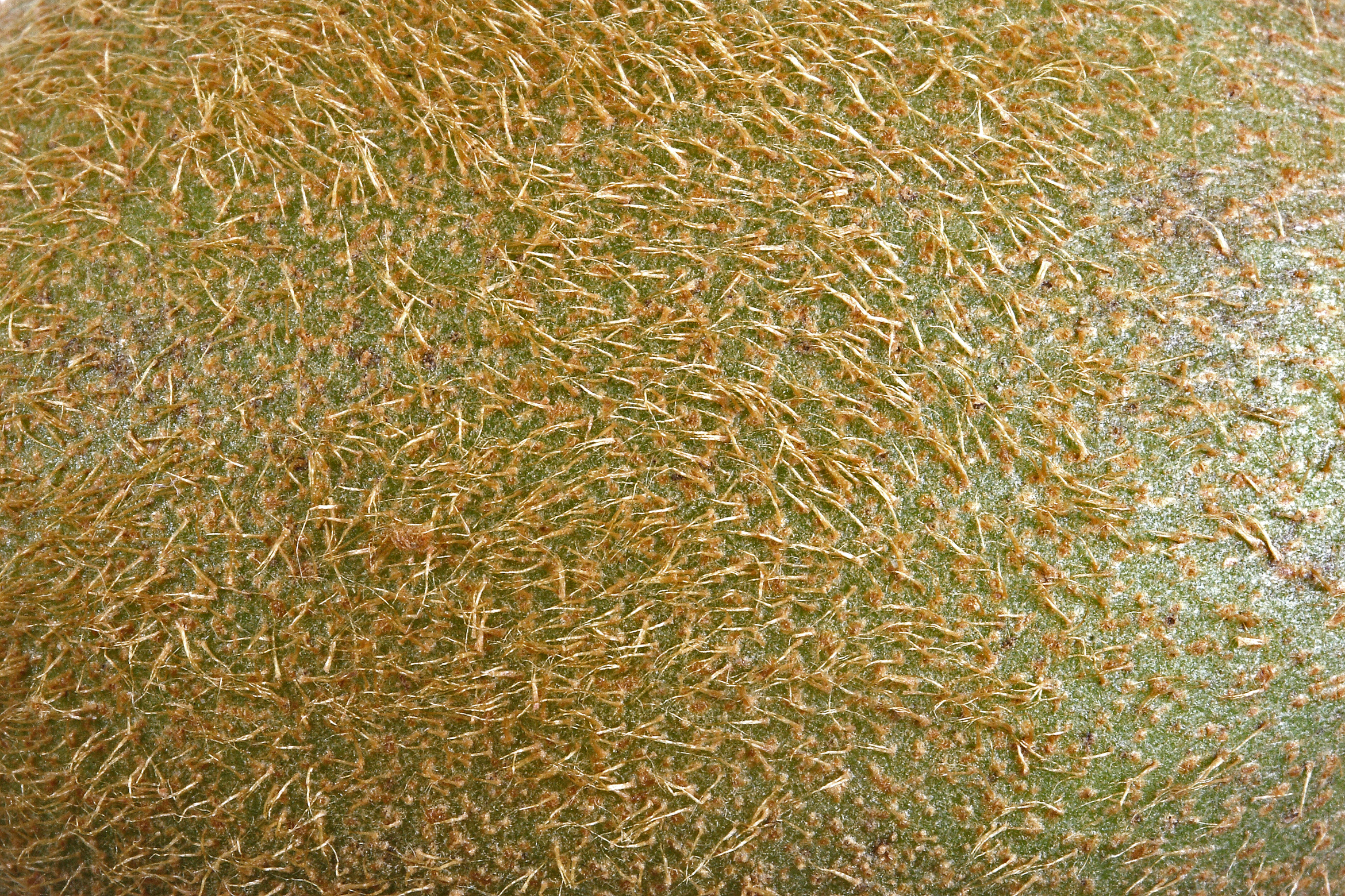 Kiwi fruit surface